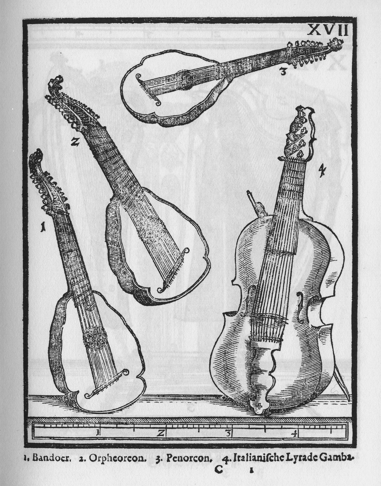 Syntagma Musicum Theatrum Instrumentorum seu Sciagraphia Wolfenbüttel 1620